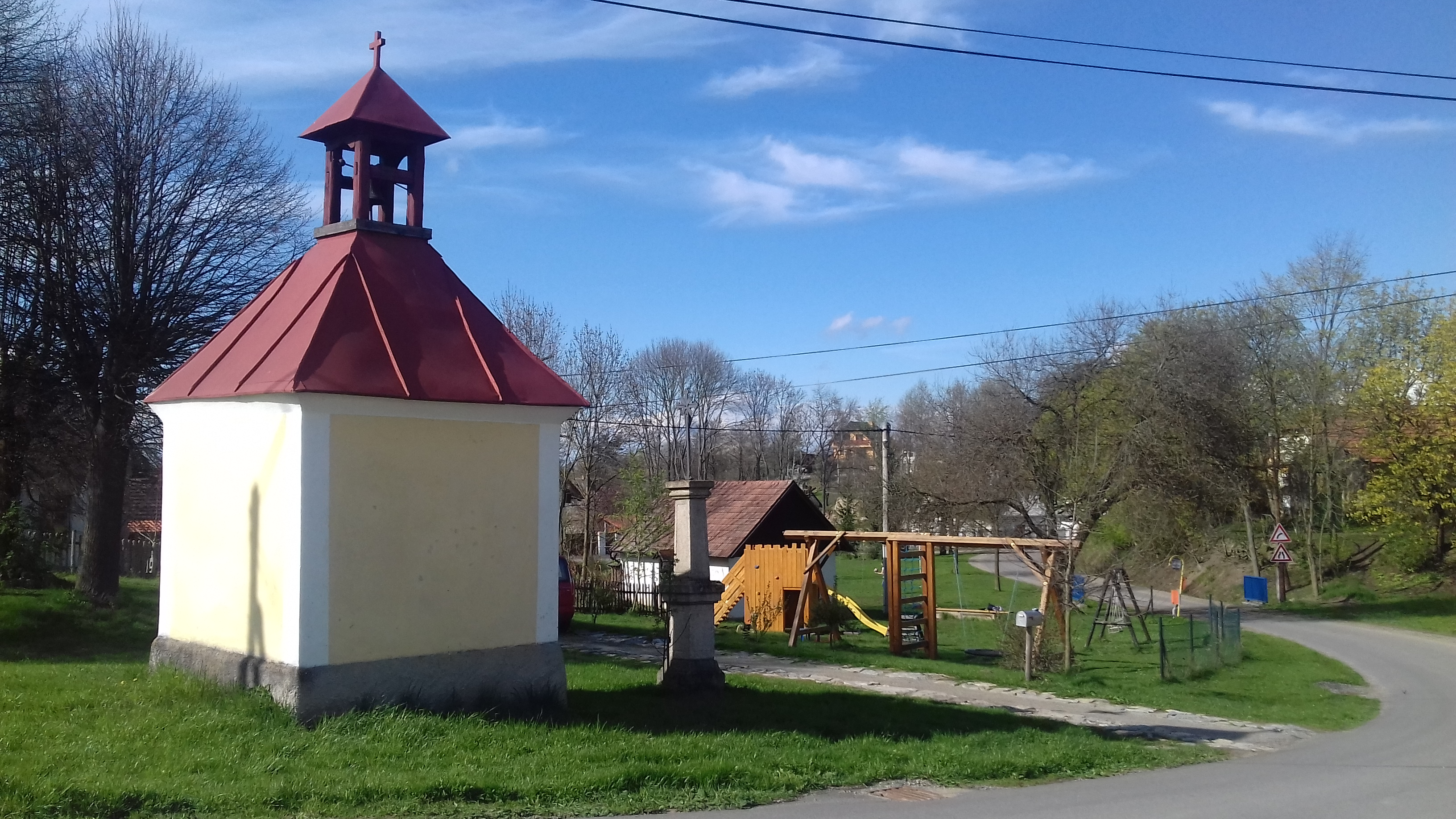 vesnice Dobříčkov, část obce Postupice v okrese Benešov